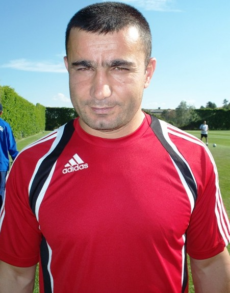 фут. тренер Гурбан Гурбанов (Азербайджан)